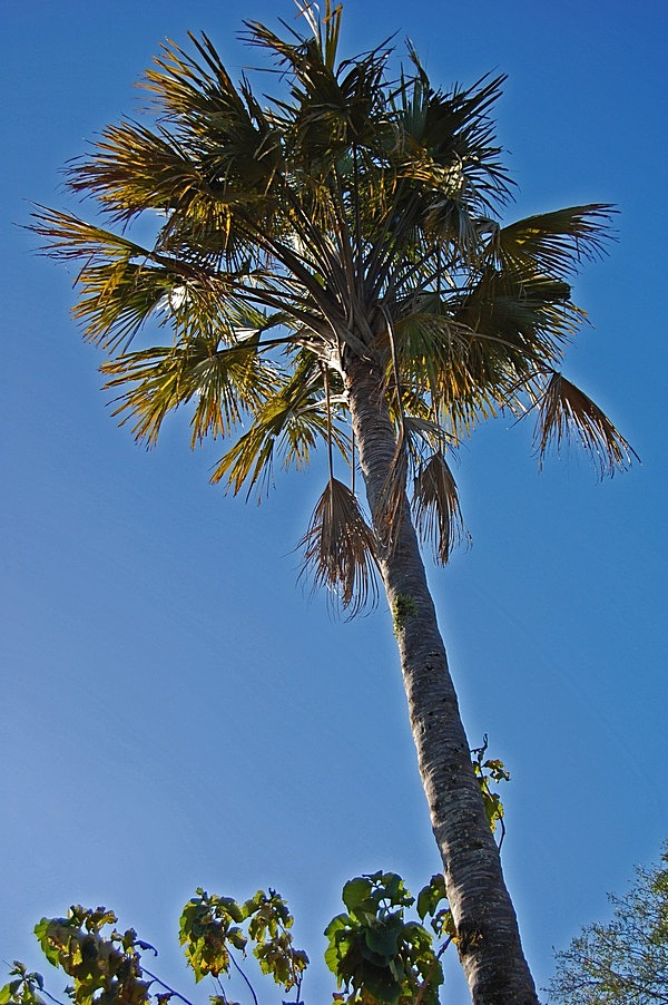 Gebang palm, Corypha utan. From Banyumas, Central Java, Indonesia